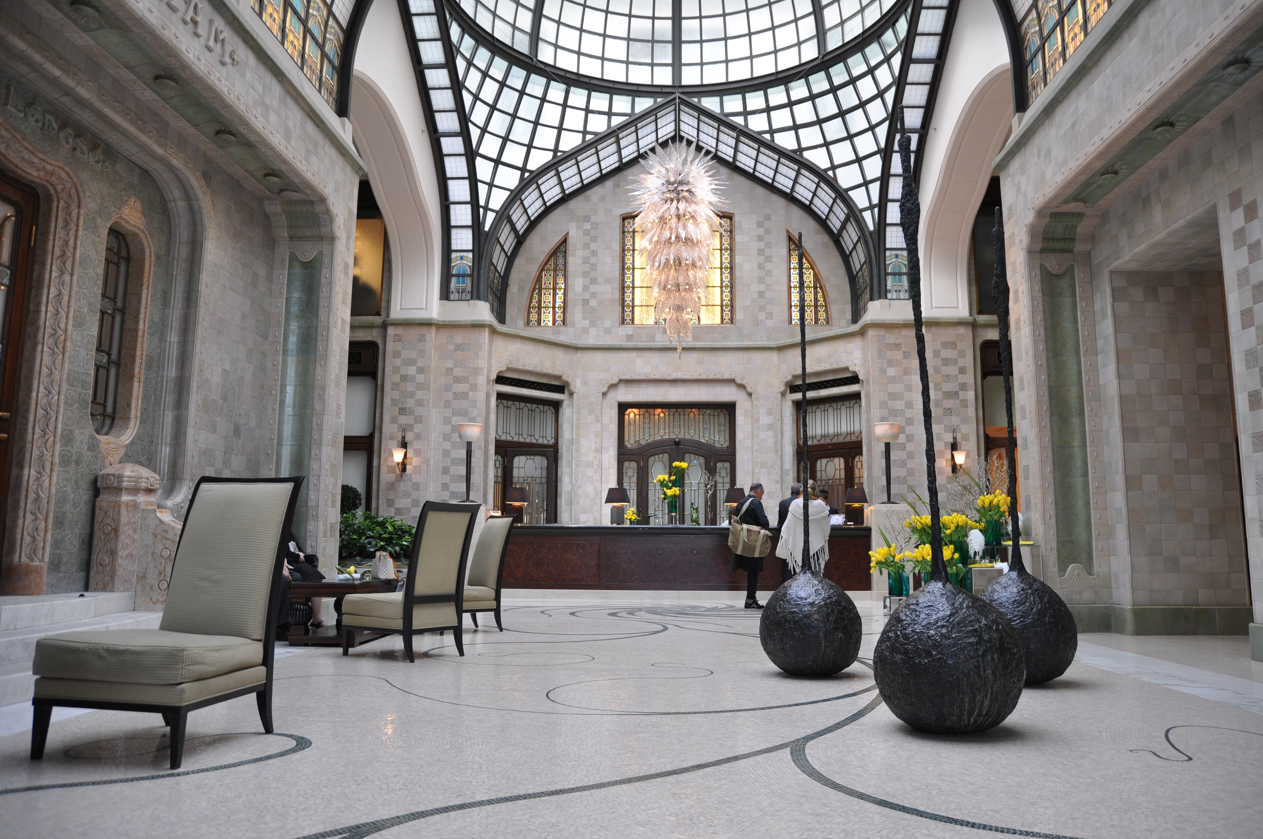 Budapest, Gresham-palota